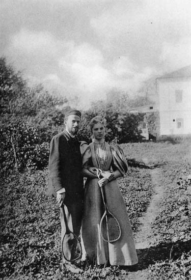 Лев Львович Толстой с женой Дорой Вестерлунд в Ясной Поляне. Фотография 1896 года